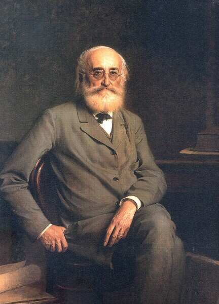 Tisza Kálmán (1830–1902) politikus, miniszter, miniszterelnök, a Magyar Tudományos Akadémia tiszteleti tagja portréja.